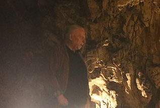 Préhistorien Rainer Blumentritt, découvreur de la grotte aux chèvres. Ici dans le site de la Hohle Fels.